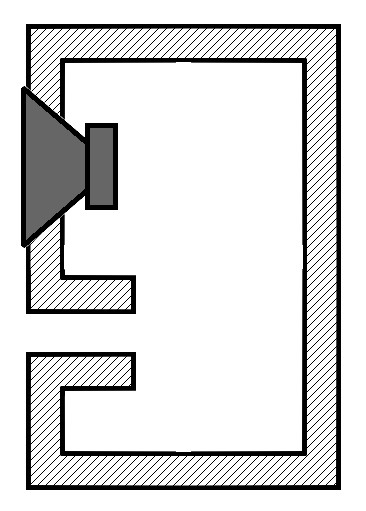 Croquis d'une enceinte bass-reflex